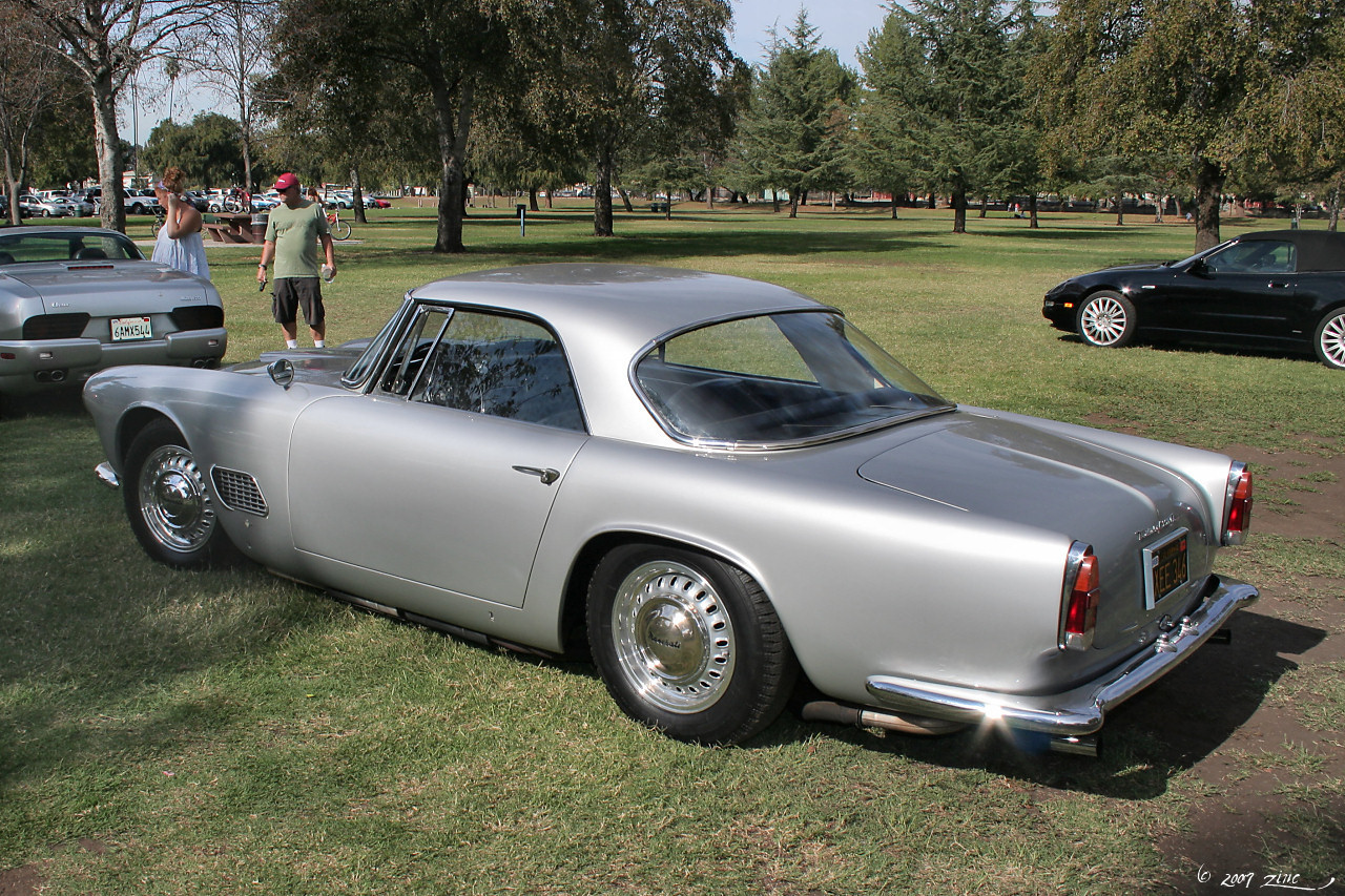 1961 Maserati 3500 GT - silver - rvl2-1